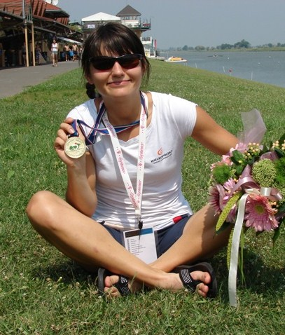 Zdjęcie zawodniczki Magdaleny Kemnitz